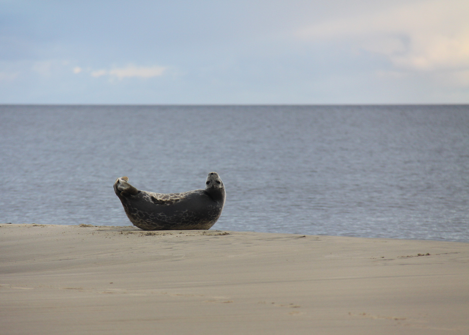 Заповедник Гыданский: Тазовский район, Ямало-Ненецкий автономный округ This image is related to the protected area of Russia number 8900014